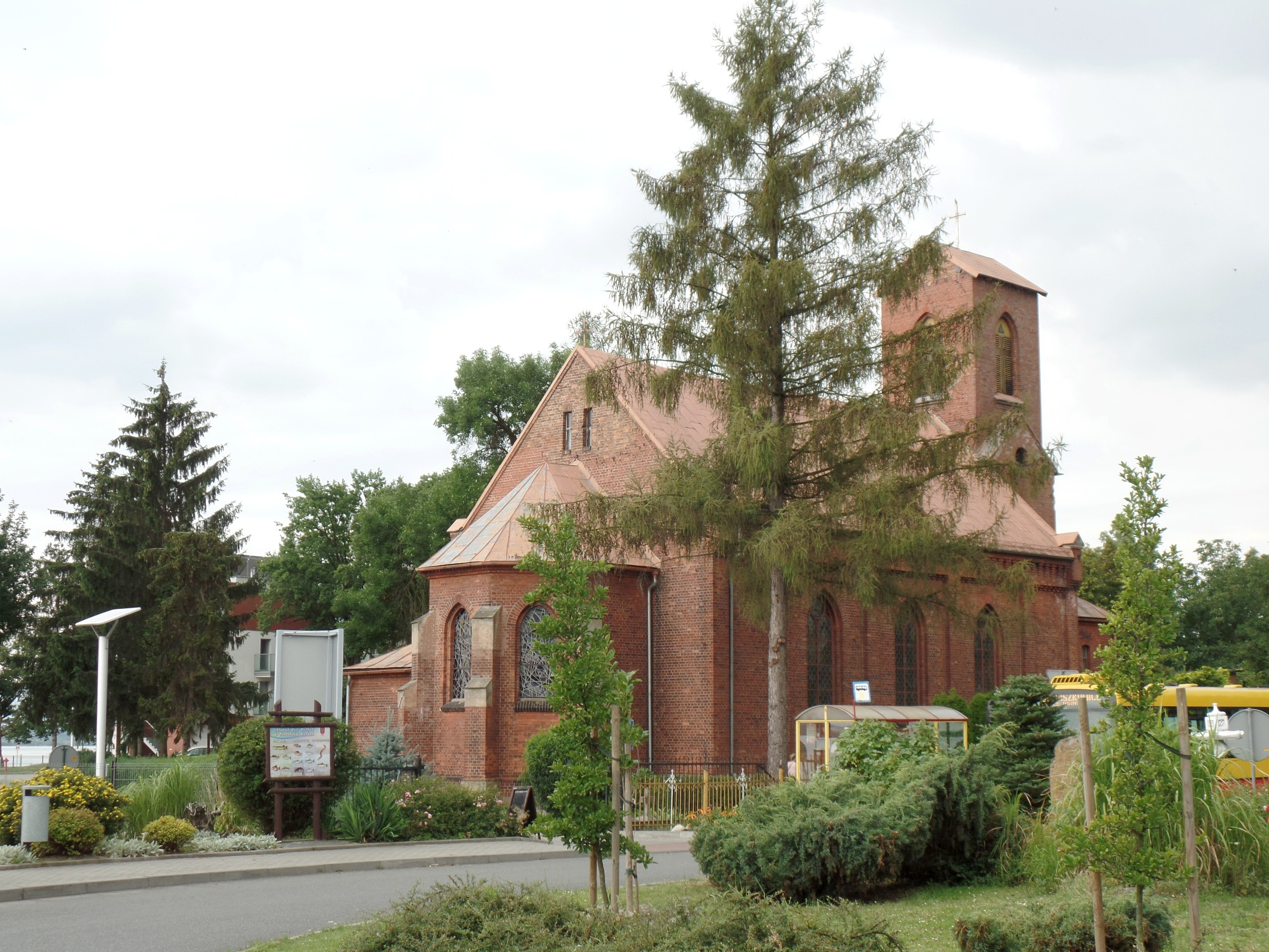 Kościół pw. św. Urbana w Głębinowie